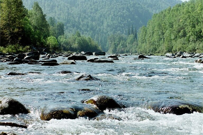 Baikalsee, Fluß Murino, Zufluß im Süden aus dem Khamar Daban Gebirge